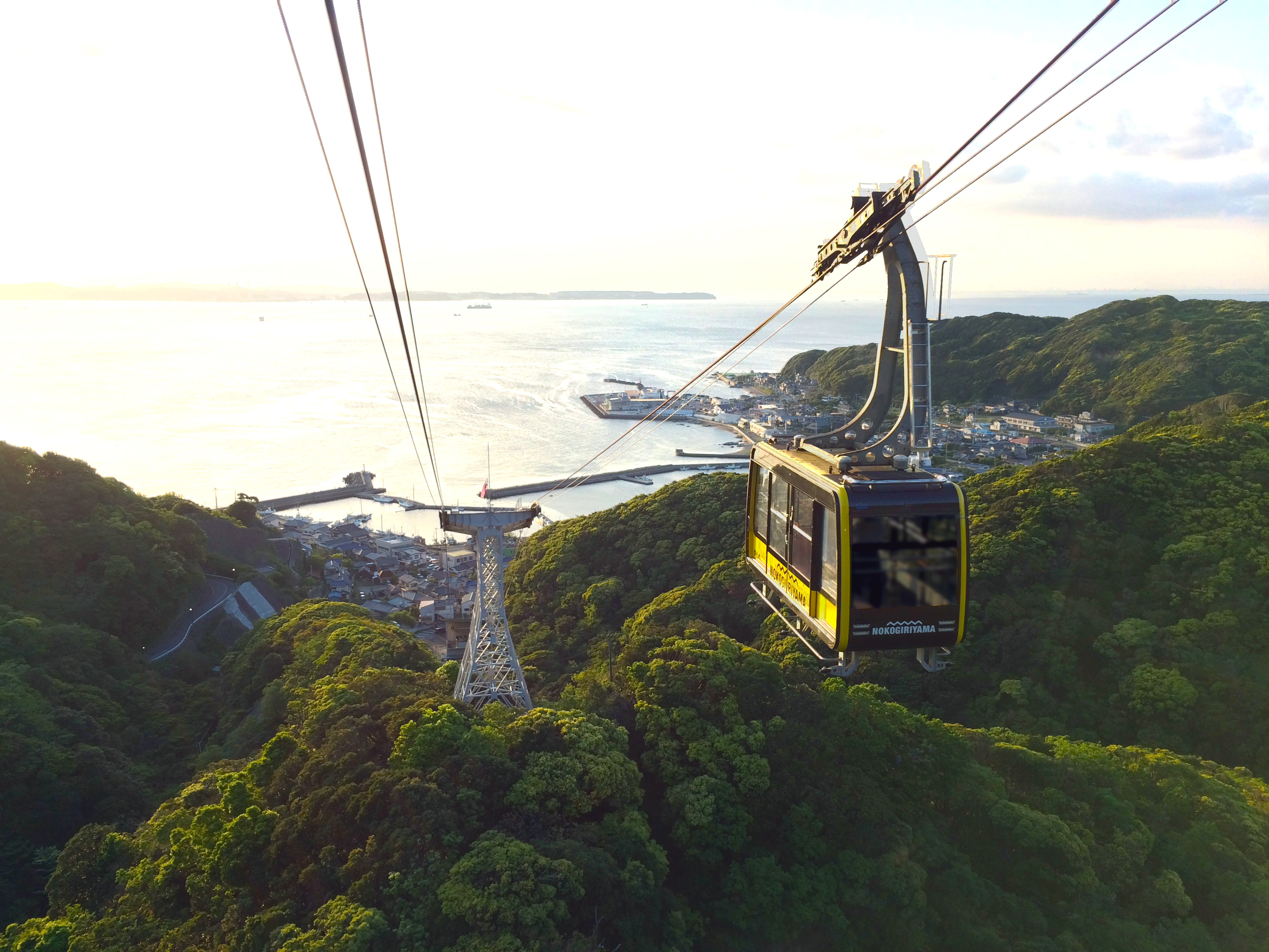 鋸山ロープウェー。車内から金谷港方面を望む。